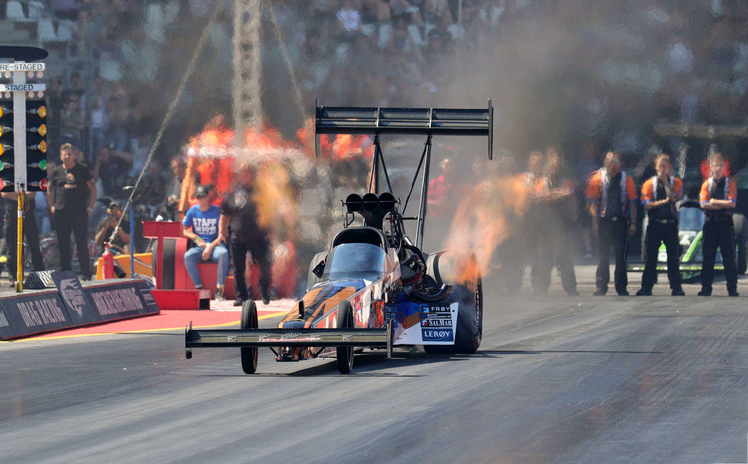 Drag Racing (FIA): Start eines Top Fuel Dragster / Maja Udtjan (NOR) / Nitrolympx 2019